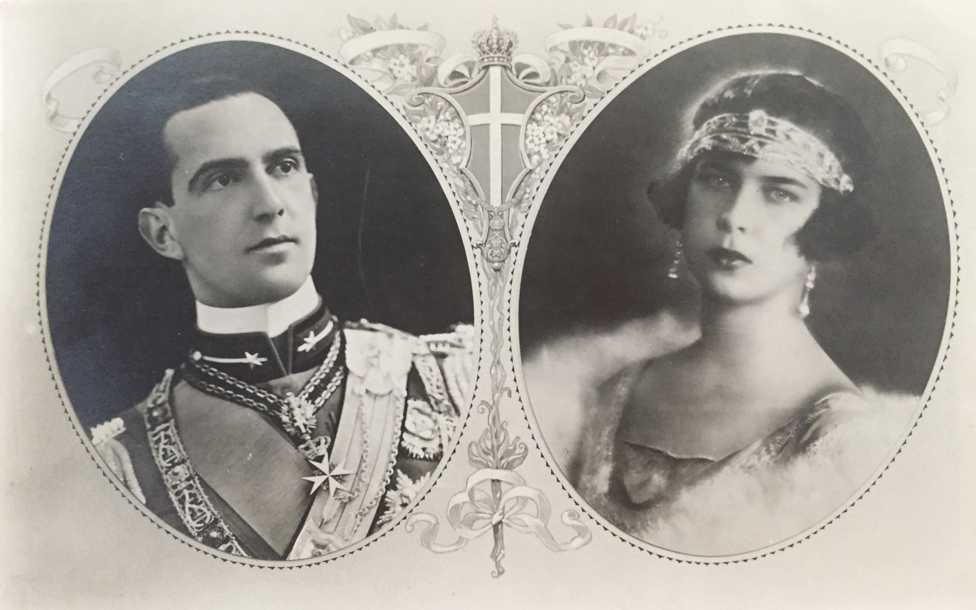 Cartolina edita in occasione del fidanzamento tra i principi Umberto d'Italia e Maria Josè del Belgio